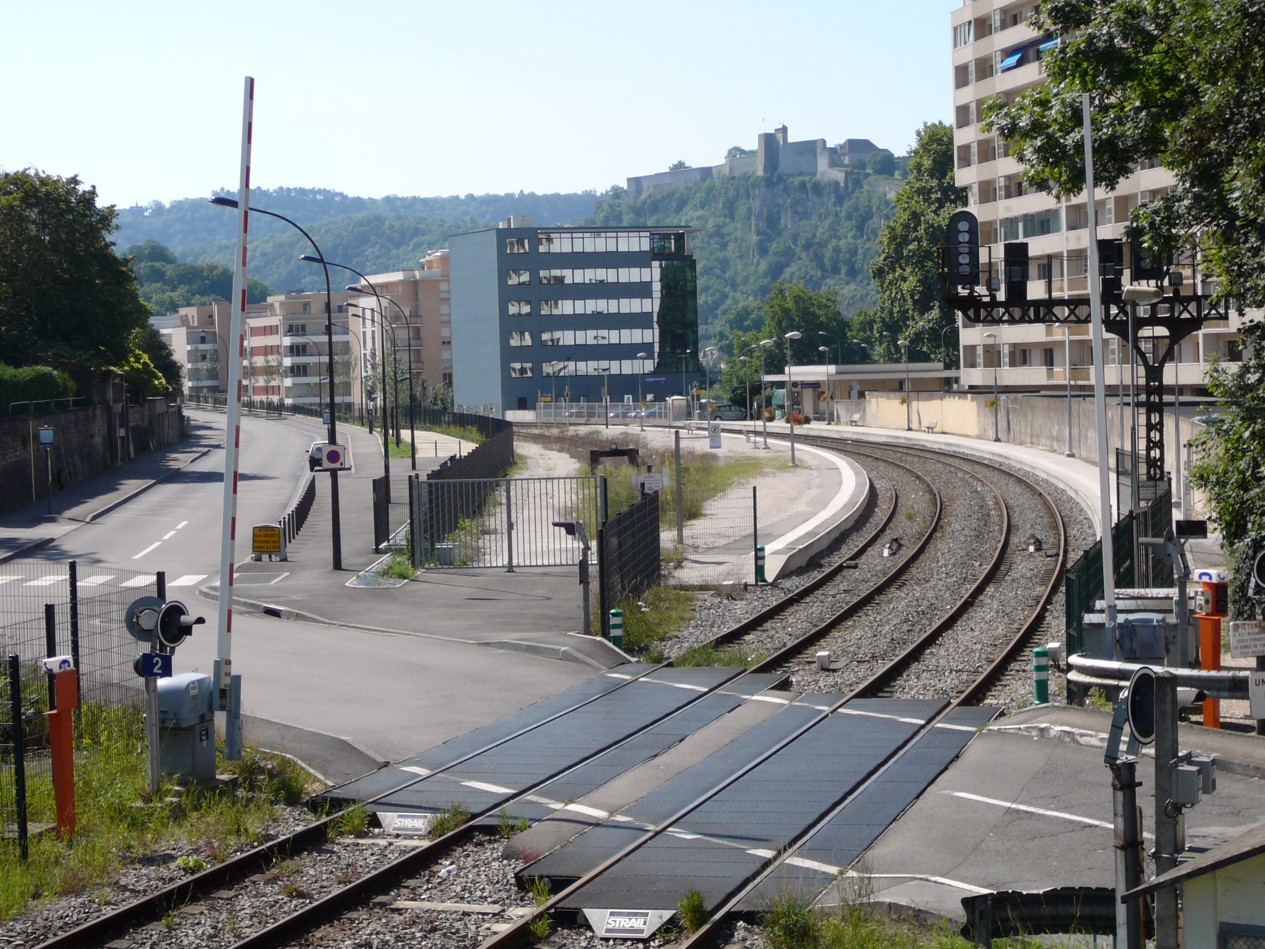 Gare de Besançon-Mouillère vue d'ensemble